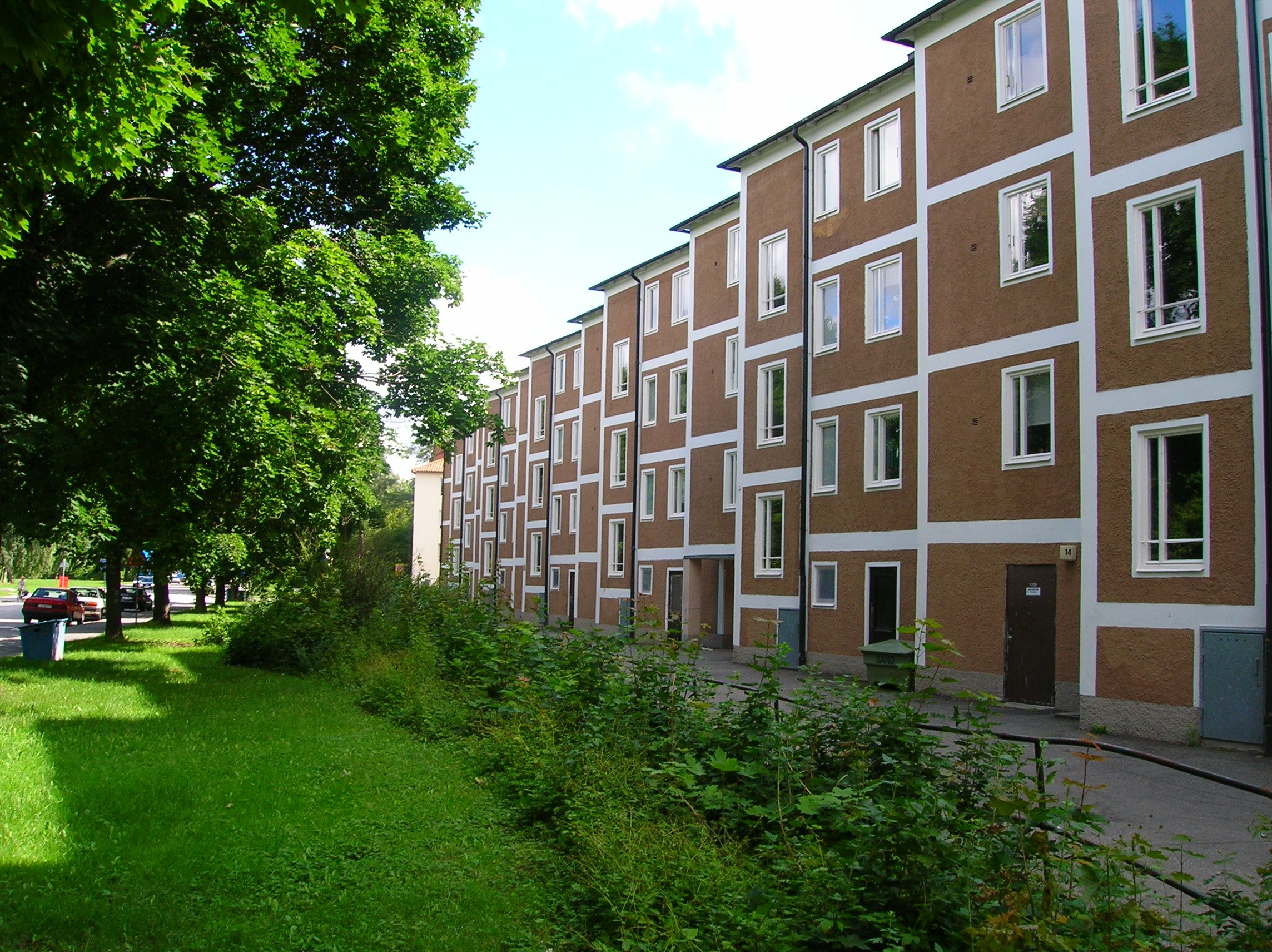 Fagersjövägen, Hökarängen, Stockholm